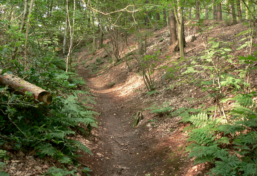 Hexentreppe auf dem Kanppsberg (Burg Steyerberg)